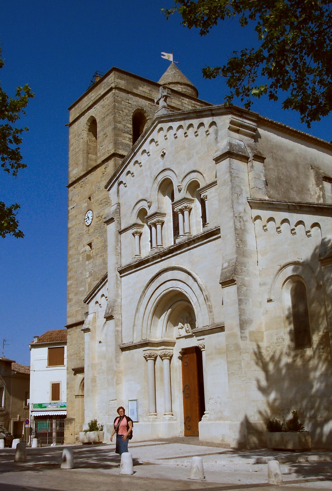 vue générale de l'église